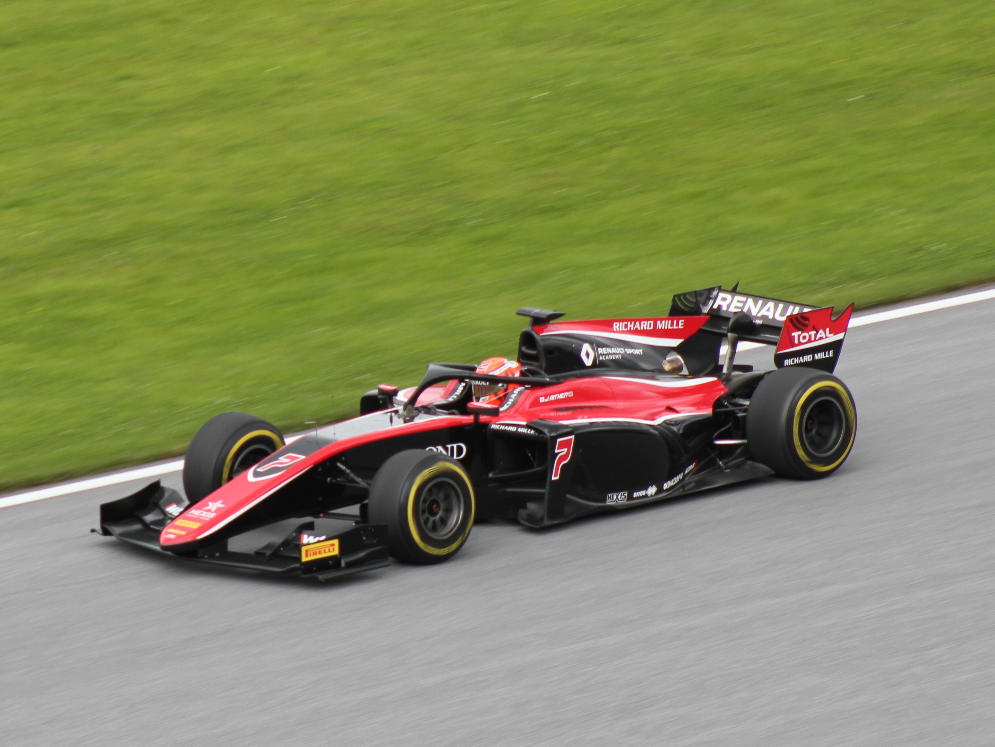 07 Jack Aitken beim Rennwochenende in Österreich 2018 (1)